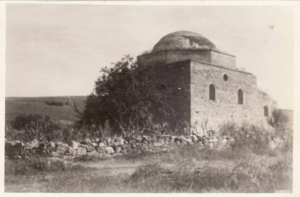 Мечеть Эски-Сарай (в долине Салгира). На фото еще присутствует в сохранности купол, т. е. не позднее 1930-х . Условная дата на отпечатке 12.05.21 может быть и номером.